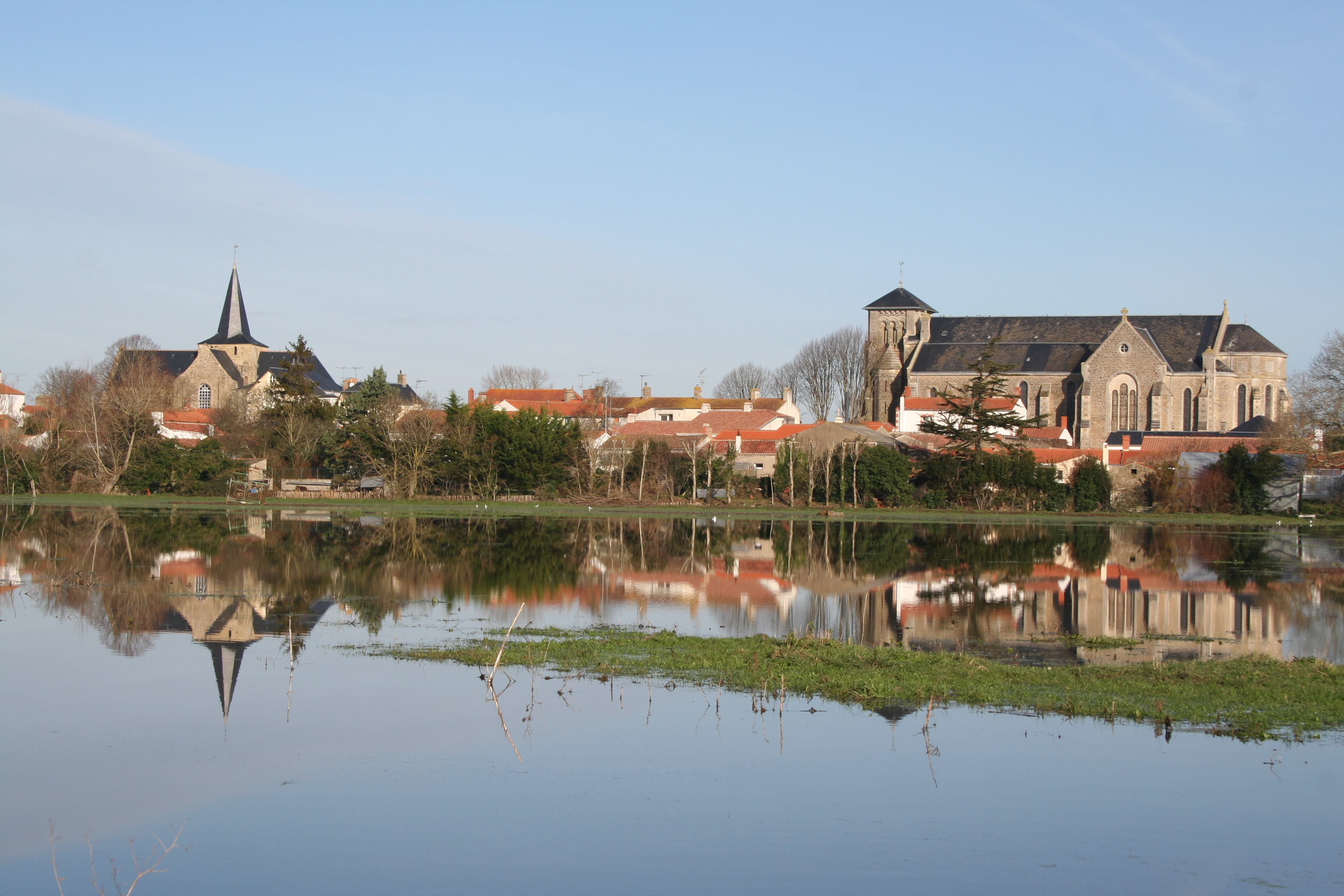 Sallertaine, les 2 eglises, decembre 2006